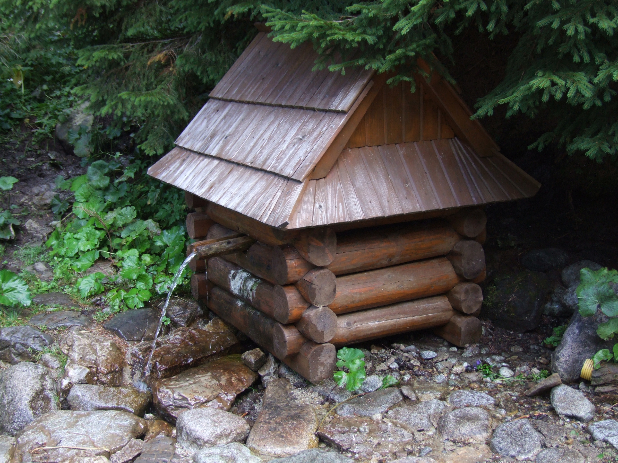 Zadnia Koperszadzka Pastwa